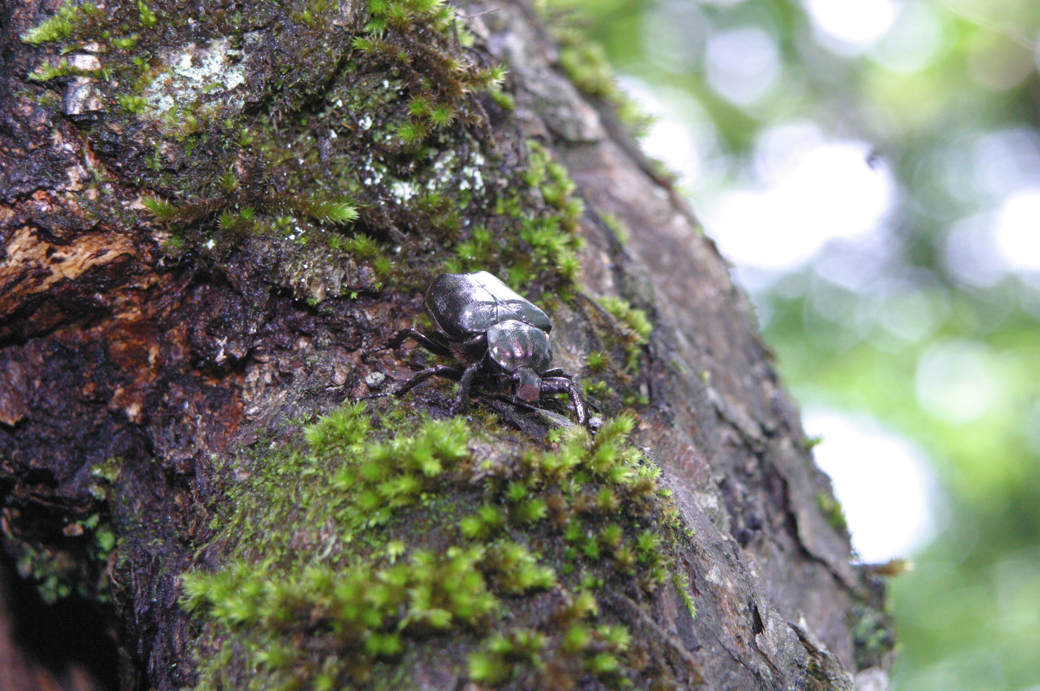 栃木県の標高1000m付近のミズナラの大木の樹洞に飛来したオオチャイロハナムグリの♀。この後樹洞に入ったため産卵に訪れたと思われる。